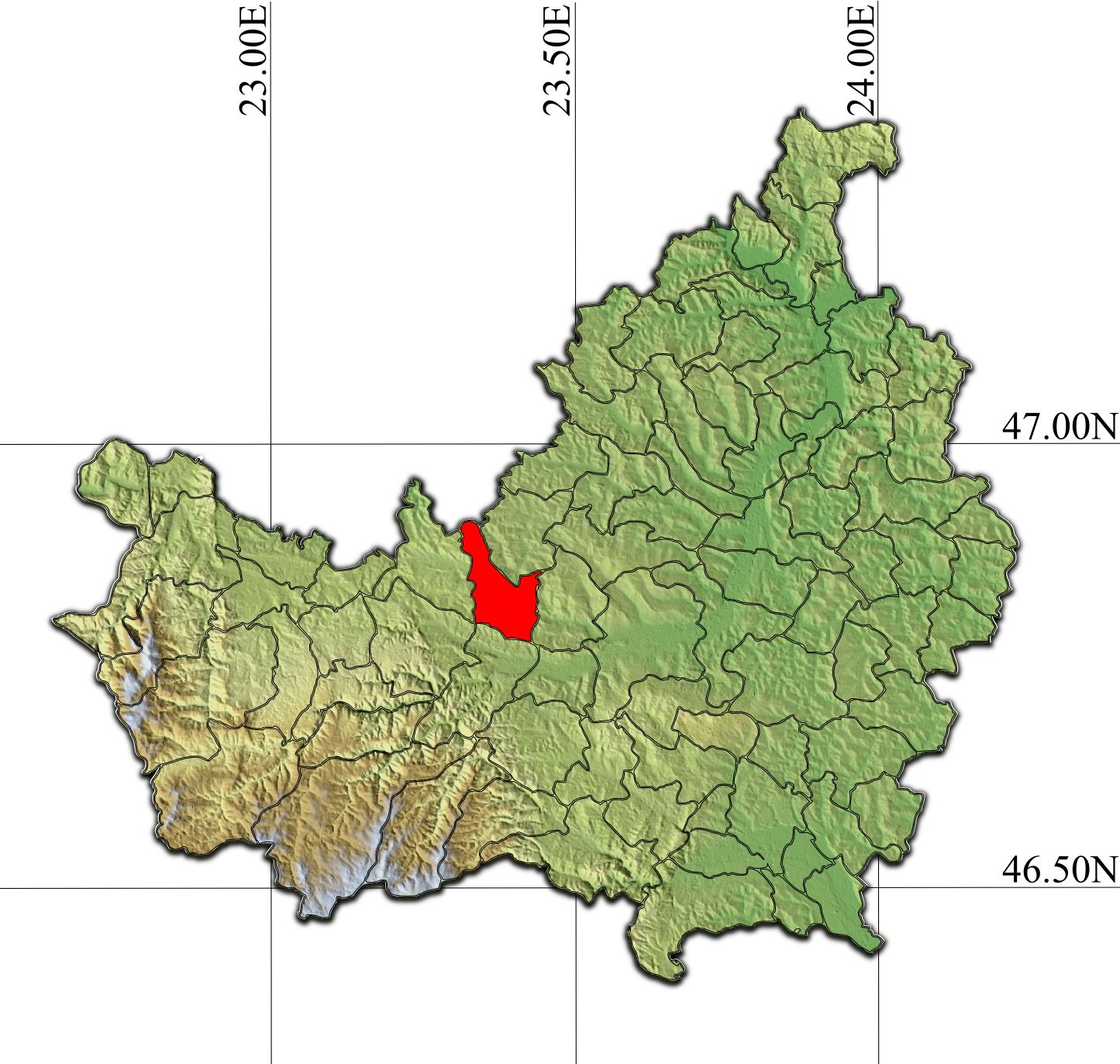 Garbau jud Cluj